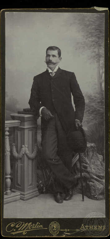 Гръцкият андартски капитан и офицер Александрос Кондулис.